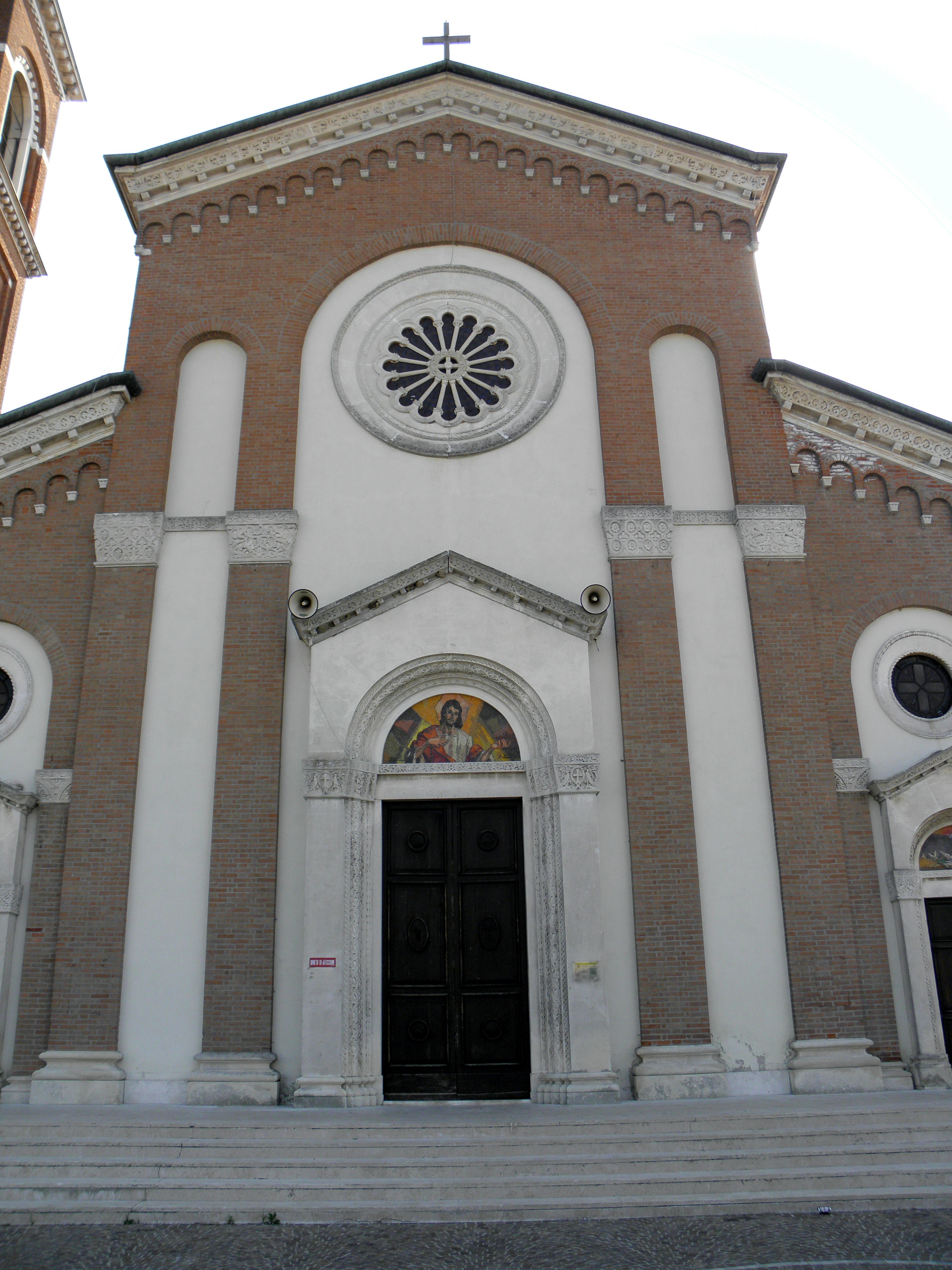 Corte, frazione di Piove di Sacco: la facciata della chiesa parrocchiale di San Tommaso Apostolo.